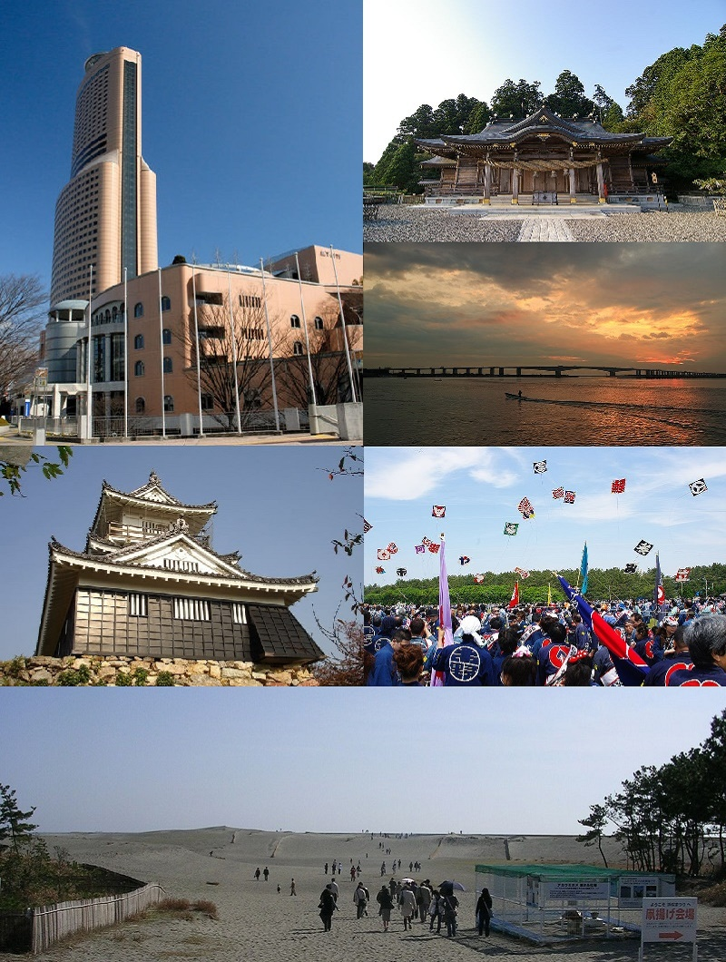 静岡県浜松市のモンタージュ画像。